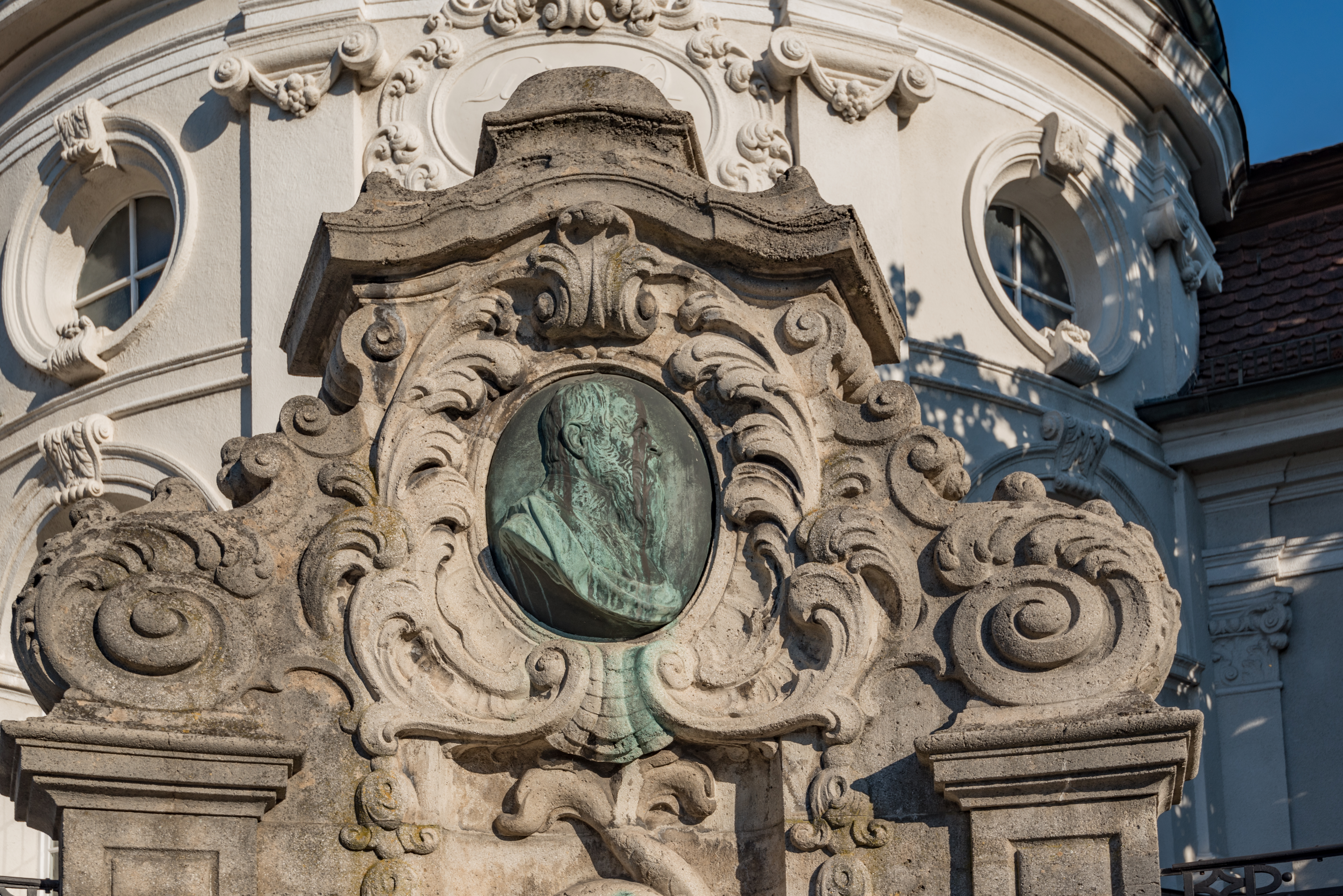 Kitzingen, Hindenburgring Süd 3, Ehemaliges Luitpoldbad